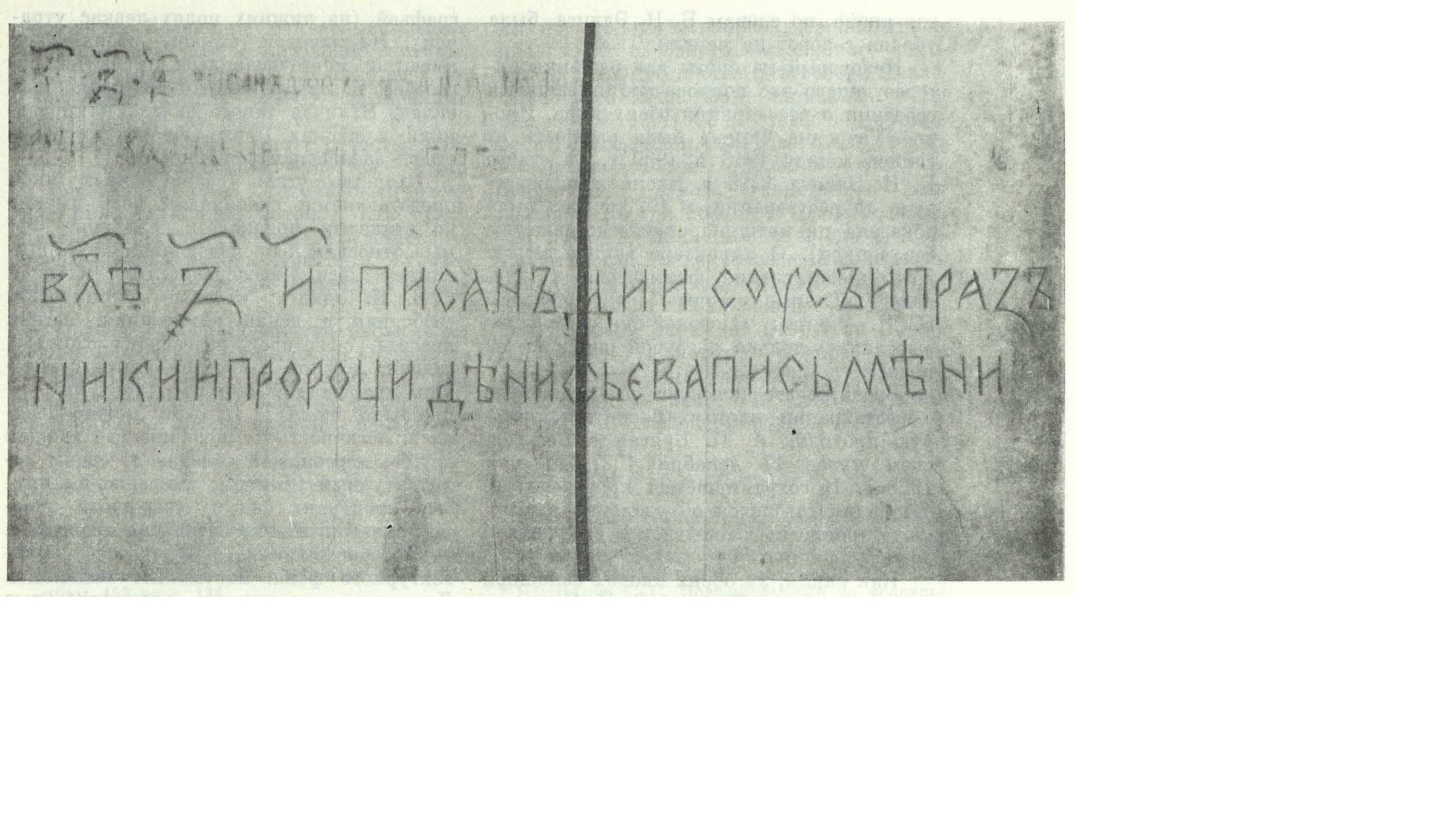 Надписи на обороте иконы Дионисия "Спас в Силах" из Павло-Обнорского монастыря